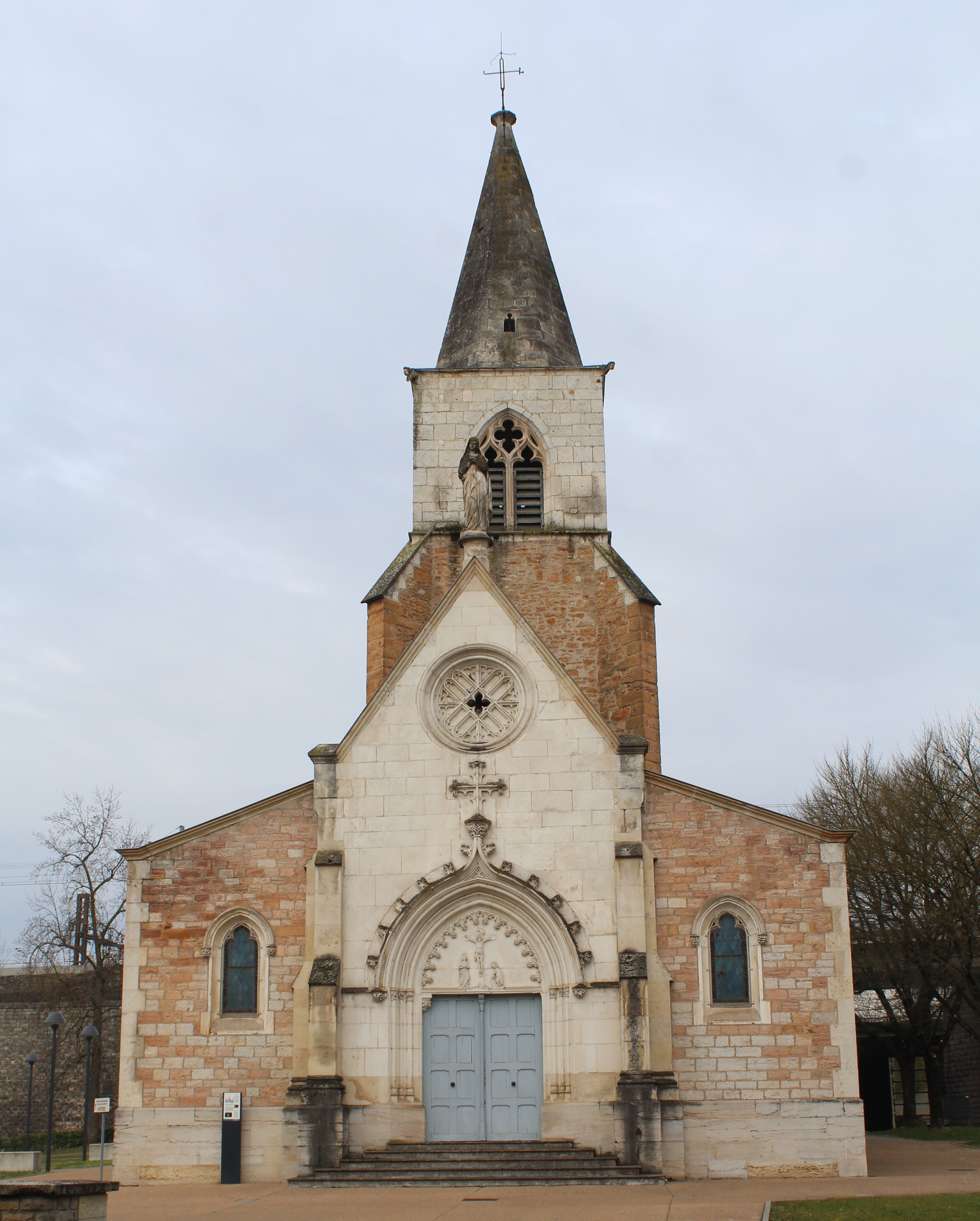 Église Saint-Clément à Mâcon.